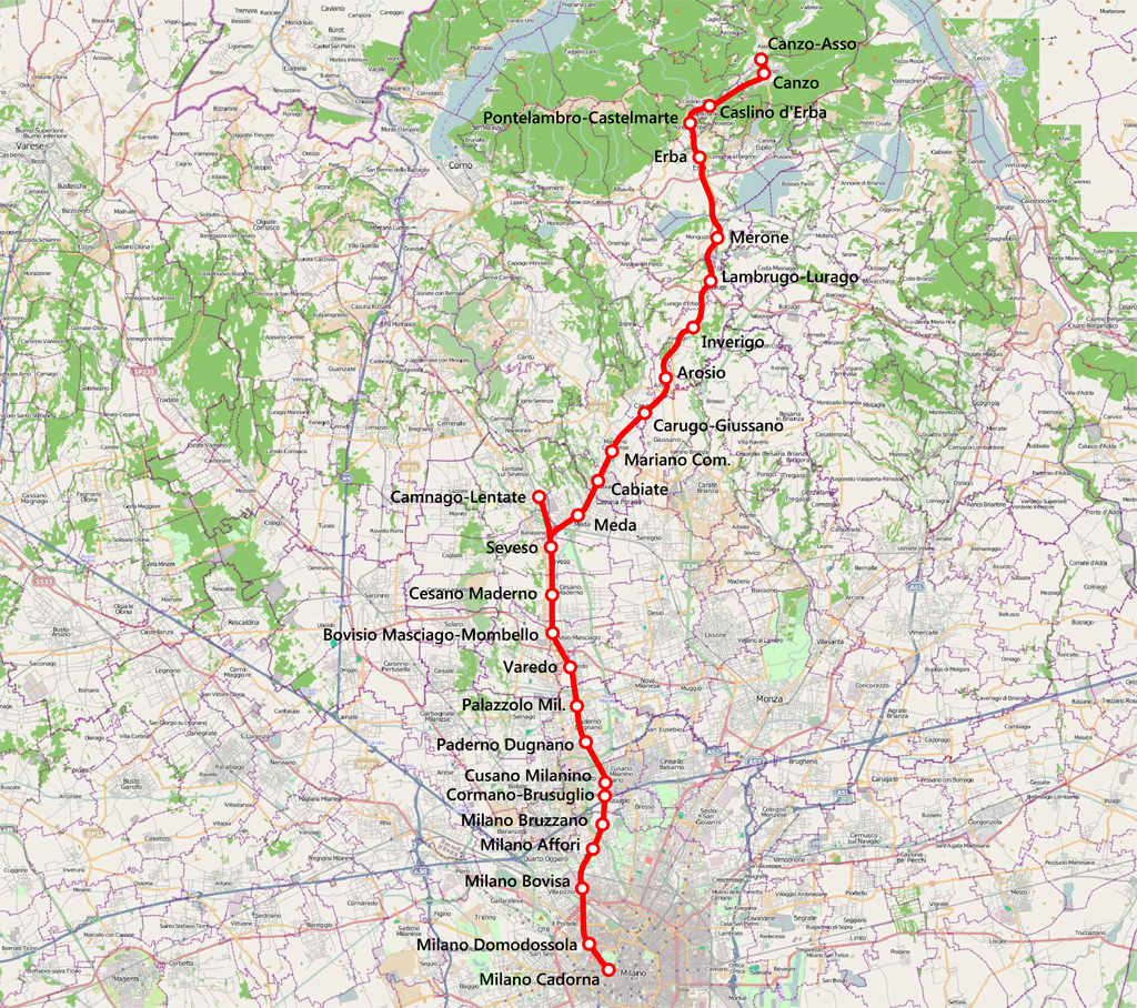 Mappa della ferrovia Milano-Asso